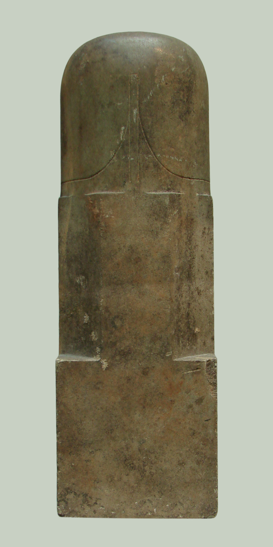 Linga. Cambodge, province de Siemreap, 10ème siècle.